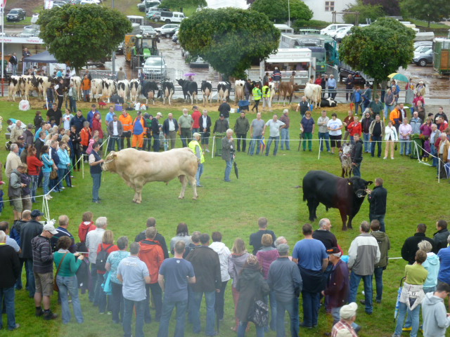 Szene aus der Beerfelder Viehschau beim Pferdemarkt Beerfelden 2014